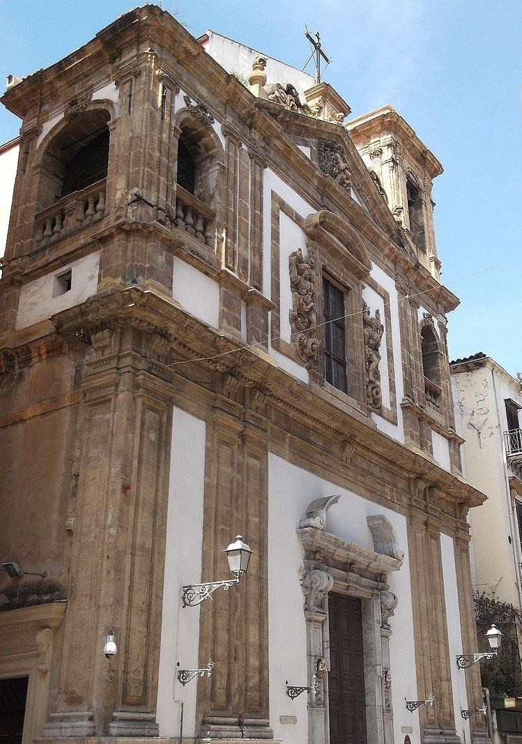 Chiesa di Sant'Orsola, Palermo